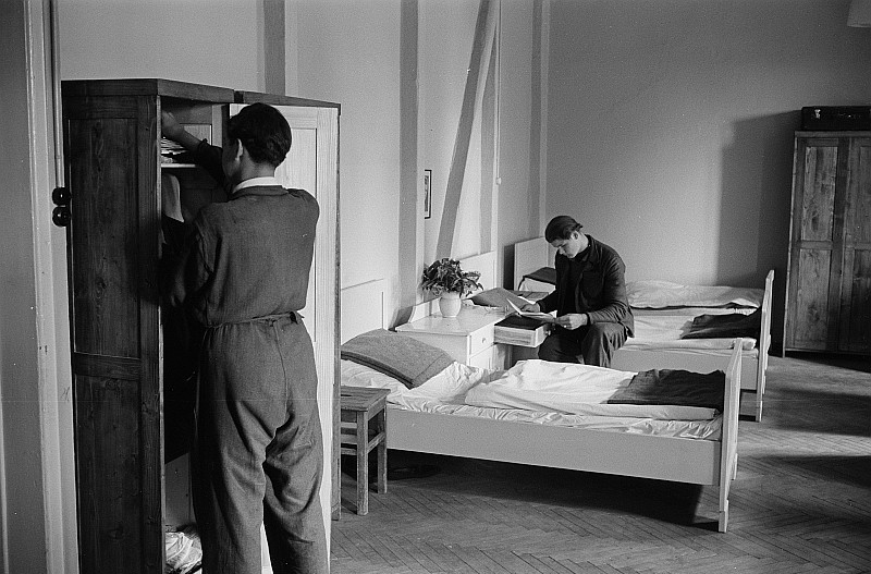 Original image description from the Deutsche Fotothek Jugendliche Häftlinge auf Stube